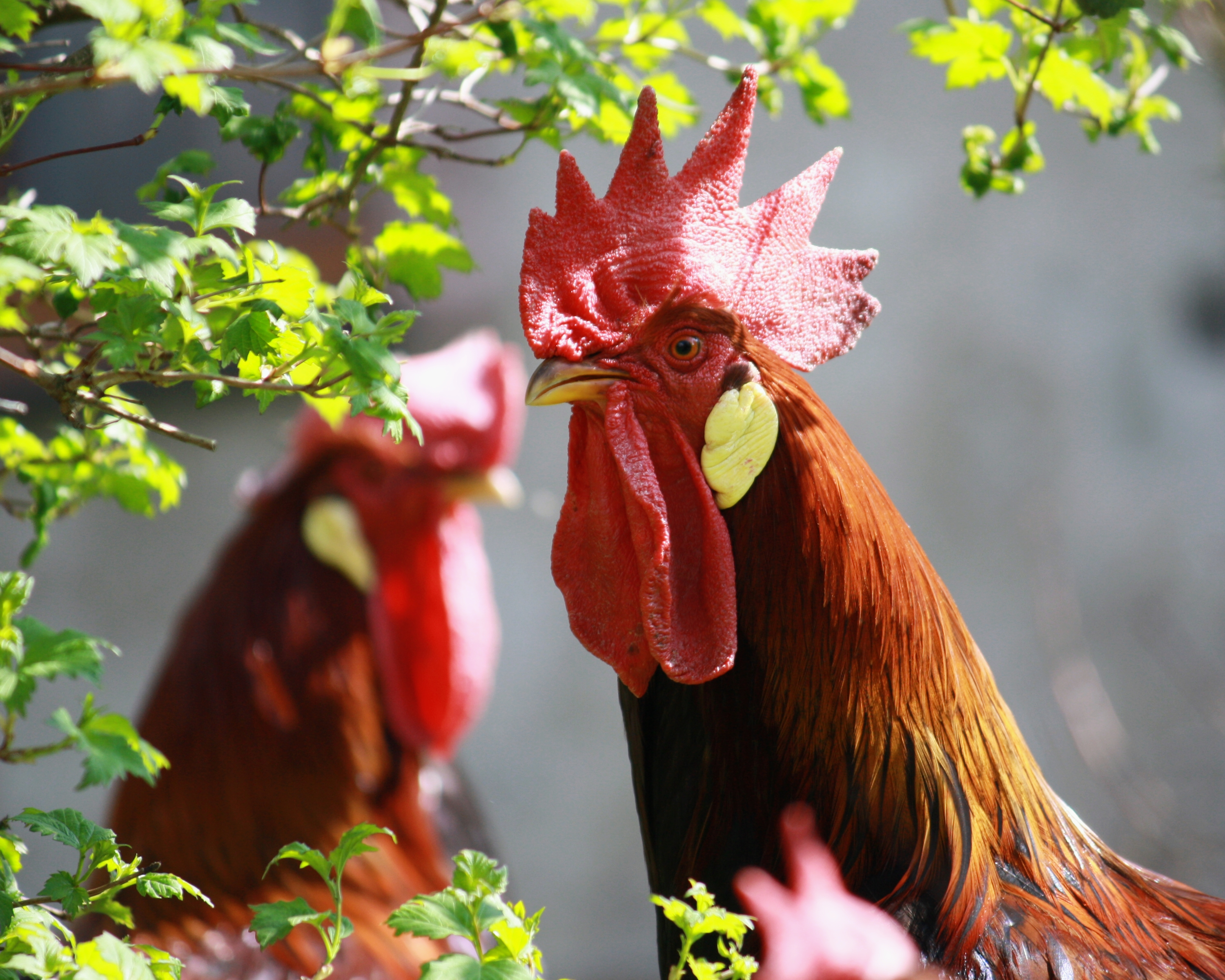 Habří - kur domácí, kohout s jednoduchým přisedlým hřebenem (vlaška koroptví) This photograph was taken within the scope of the 'Czech Municipalities Photographs' grant. This photograph was taken with a DSLR from WMCZ's Camera grant.